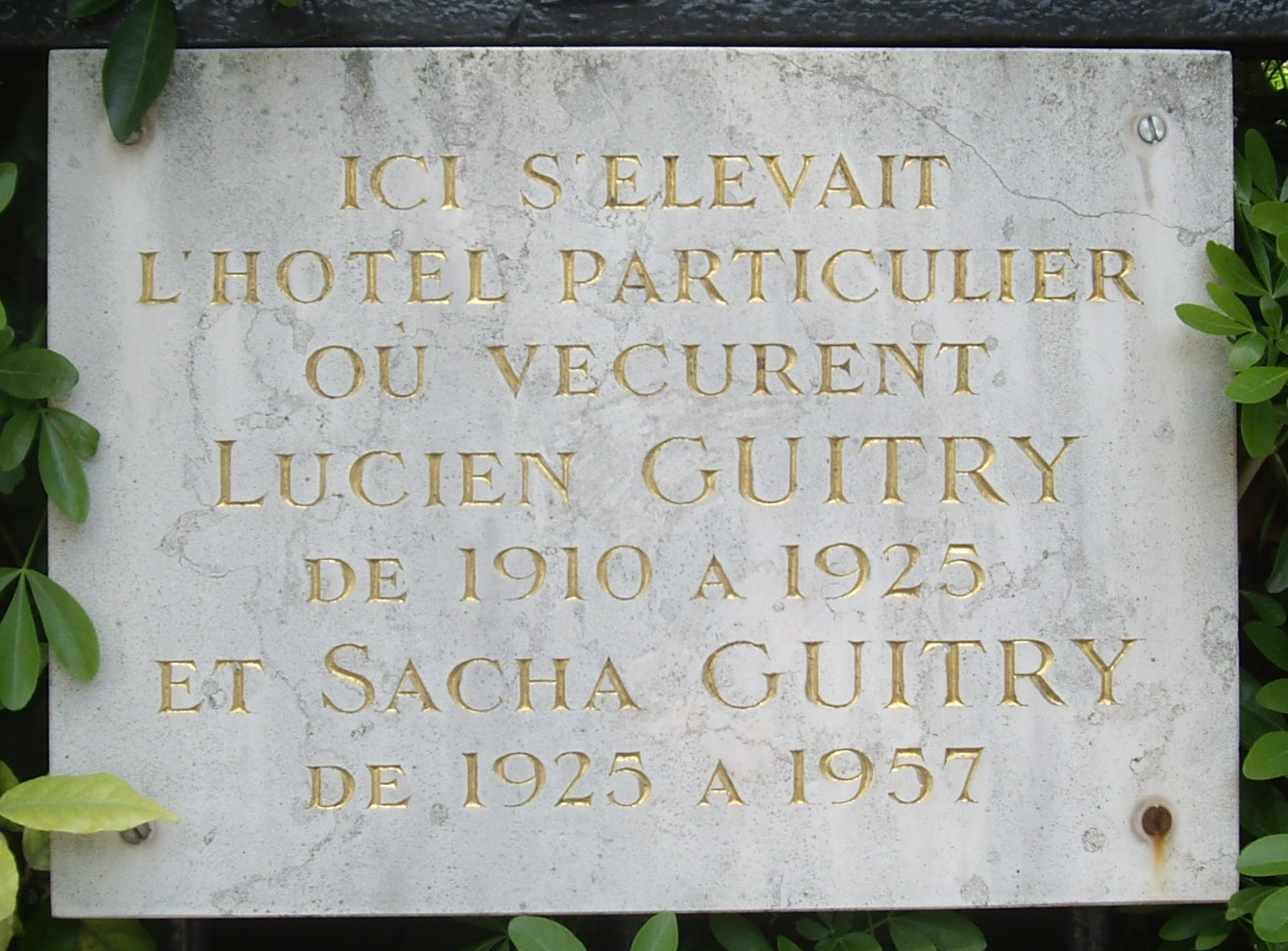 Plaque commémorative, 18 avenue Élisée-Reclus, Paris 7e. « Ici s'élevait l'hôtel particulier où vécurent Lucien Guitry de 1910 à 1925 et Sacha Guitry de 1925 à 1957. »